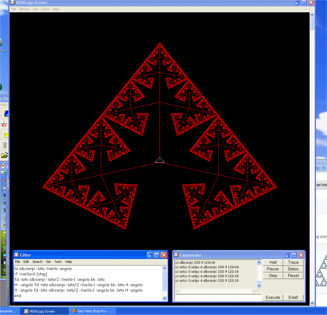 Albero ottenuto dal triangolo di Sierpinski modificando l'angolo